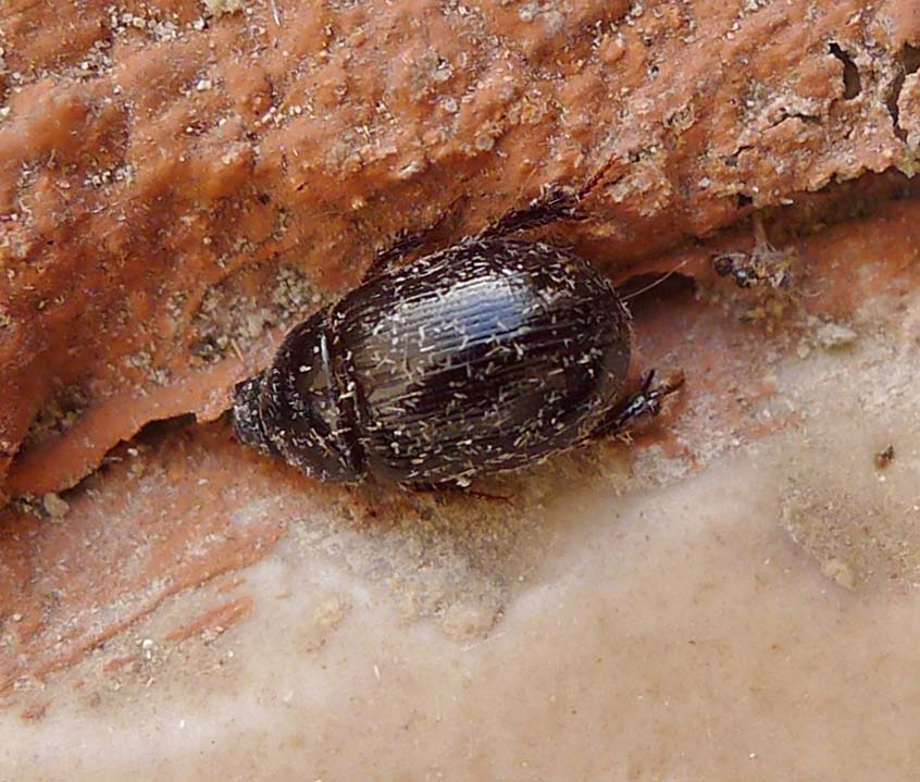 Jimena, Cadiz Province. Andalucia, Spain